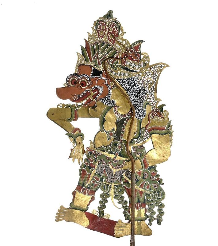 Schaduwfiguur. Wajangpop, voorstellende Batara Kala Unknown language: Wayang kulit purwa